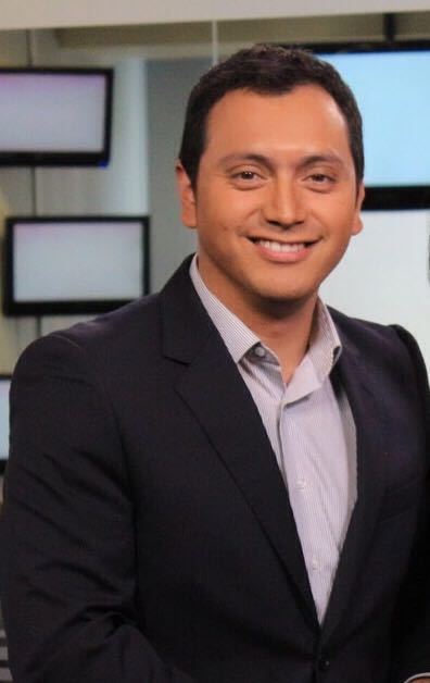 Presentador de TV